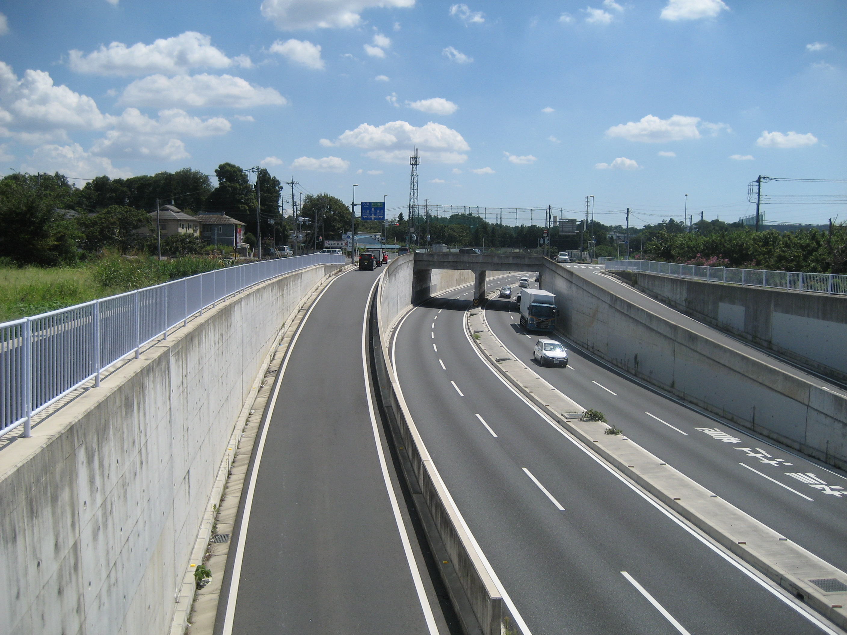 国道407号線日高バイパス埼玉県道15号線との交差付近